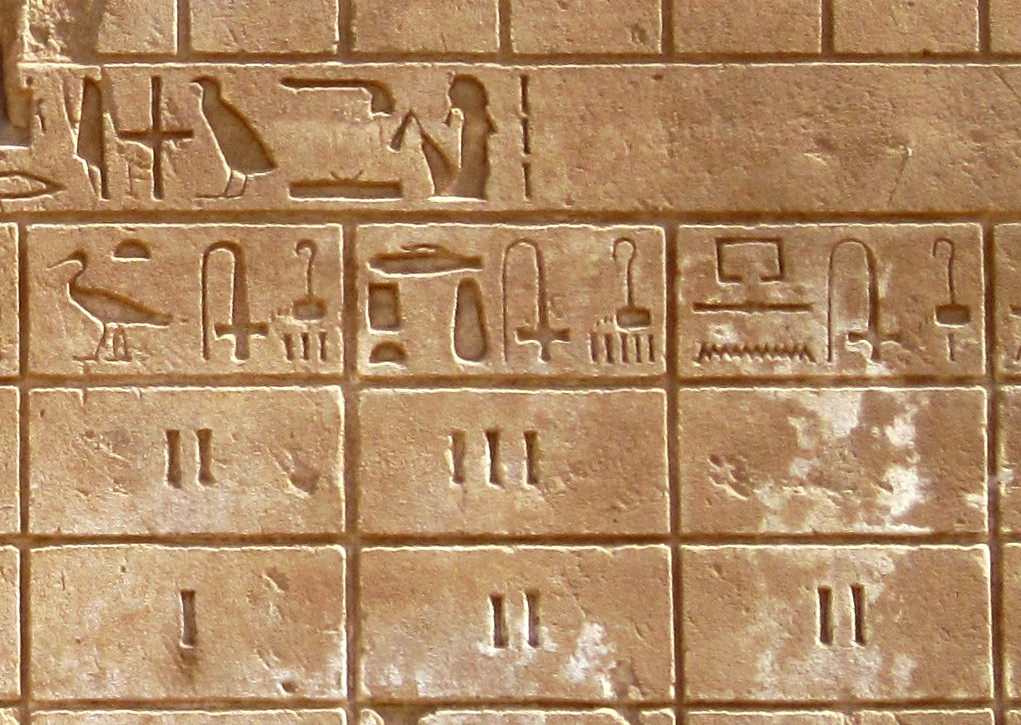 Relief (Schule) im Tempel von Karnak nördlich Luxor, Ägypten